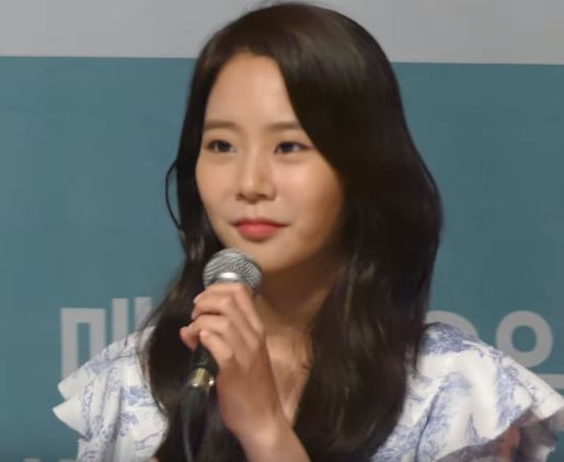 17일 오후 서울시 서초구 서초동 흰물결아트센터에서 TV조선 신개념 여행 예능프로그램 '일단 같이 가!' 제작발표회가 열려 토니안, 한승연, 아스트로 진진, MJ, 김소혜가 참석해 포토타임을 갖고 있다.